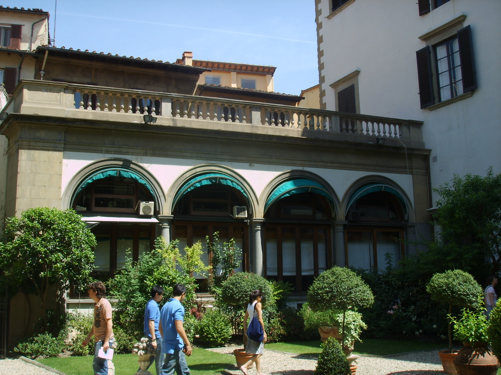 see description